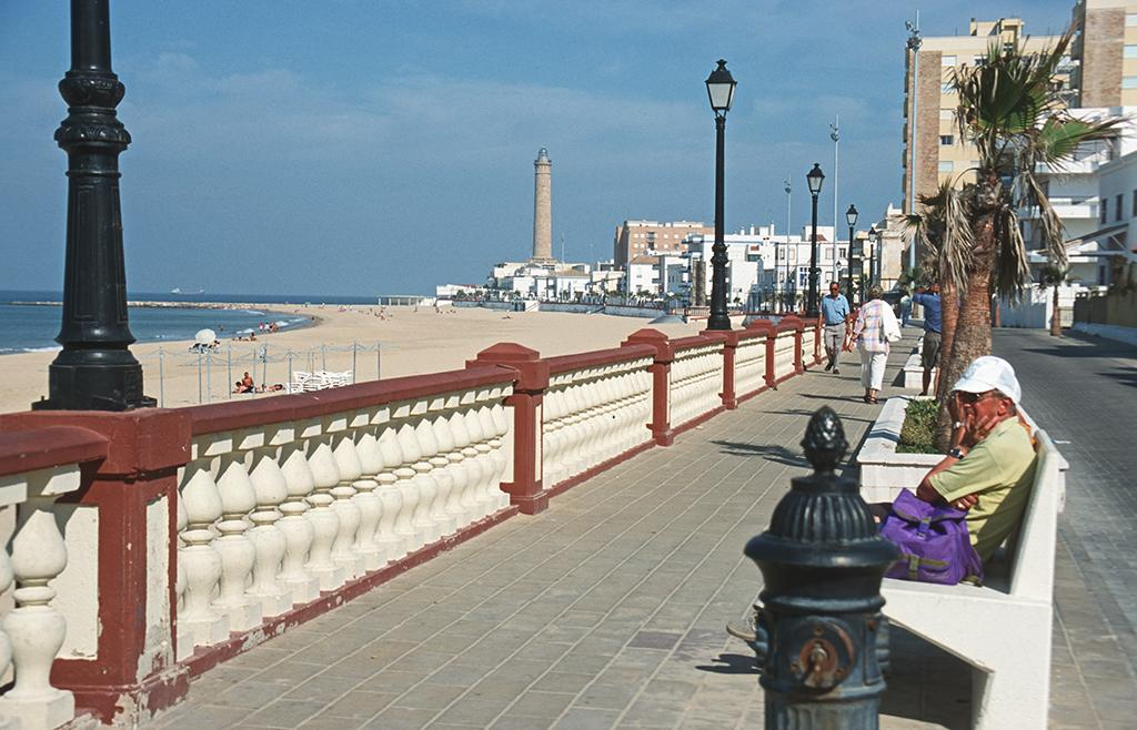 Chipiona Atlantikstrand, Richtung Norden mit Leuchtturm